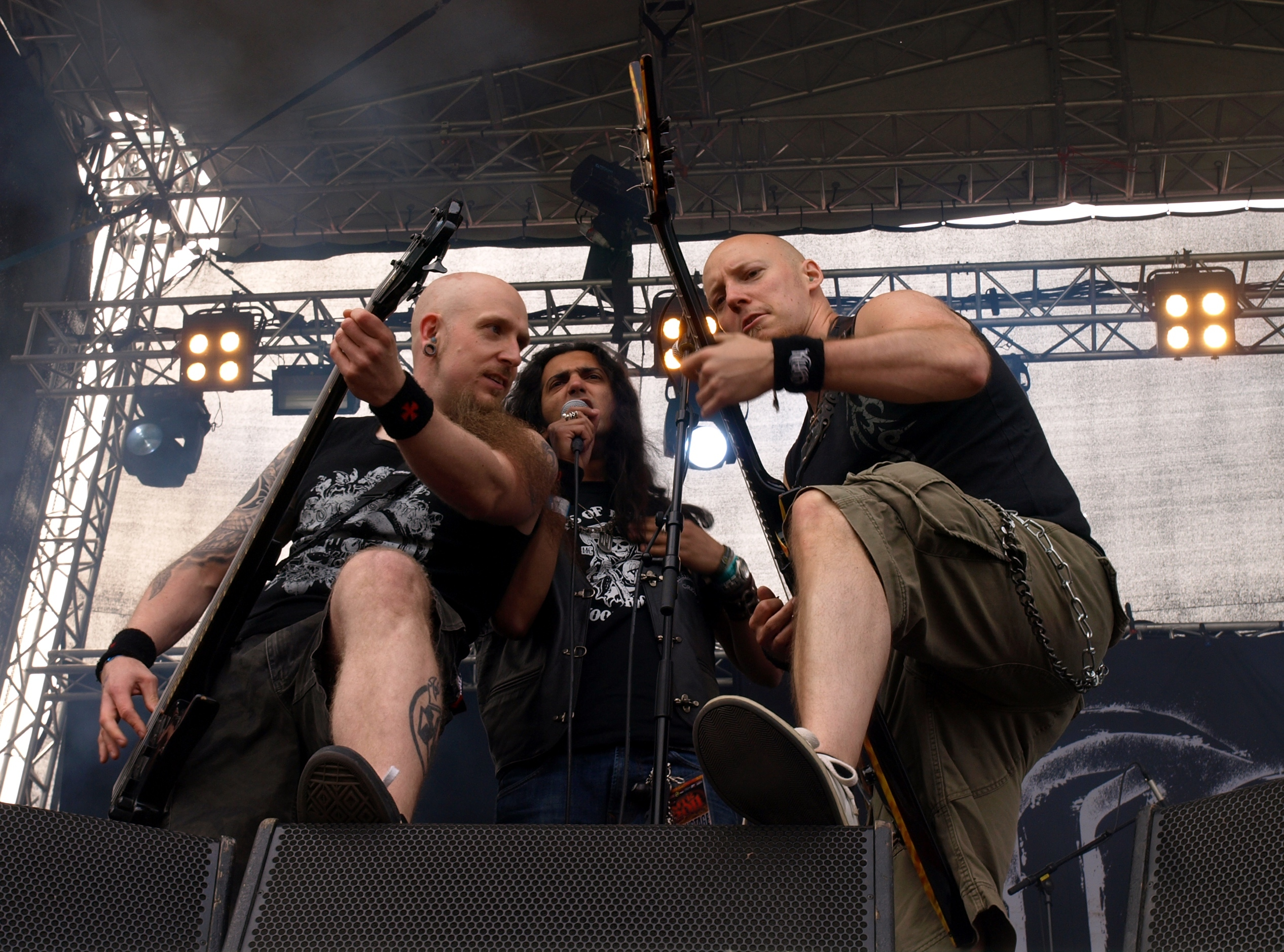 Kiuas live am Myötätuulirock 2011